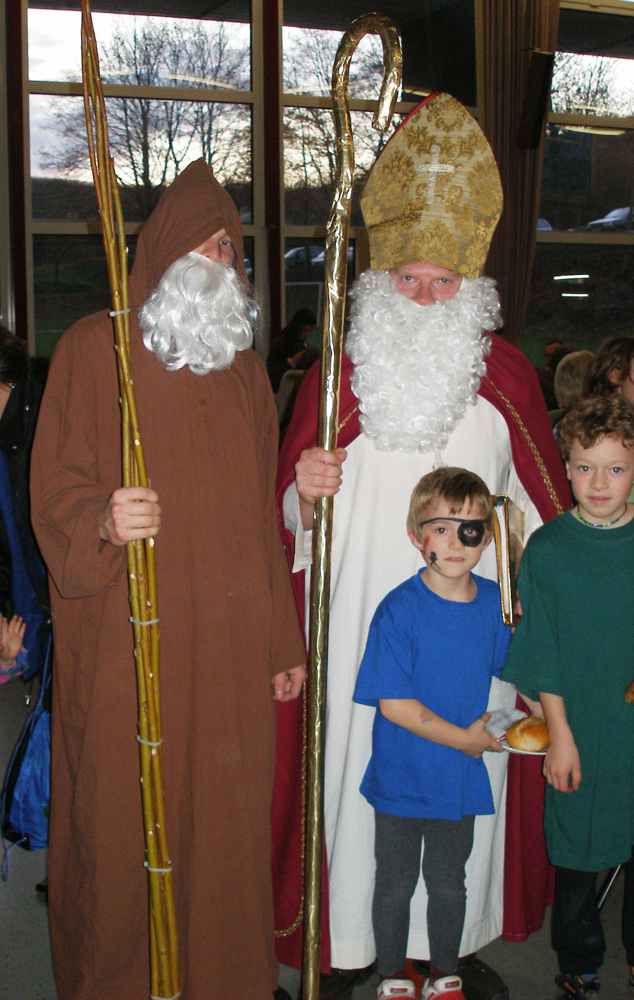 Der Nikolaus mit seinem Knecht Ruprecht. Der Nikolaus hat die Mitra (Bischofsmütze) auf und den Bischofsstab und das goldene Buch dabei. Der Ruprecht hat die Rute in der Hand.